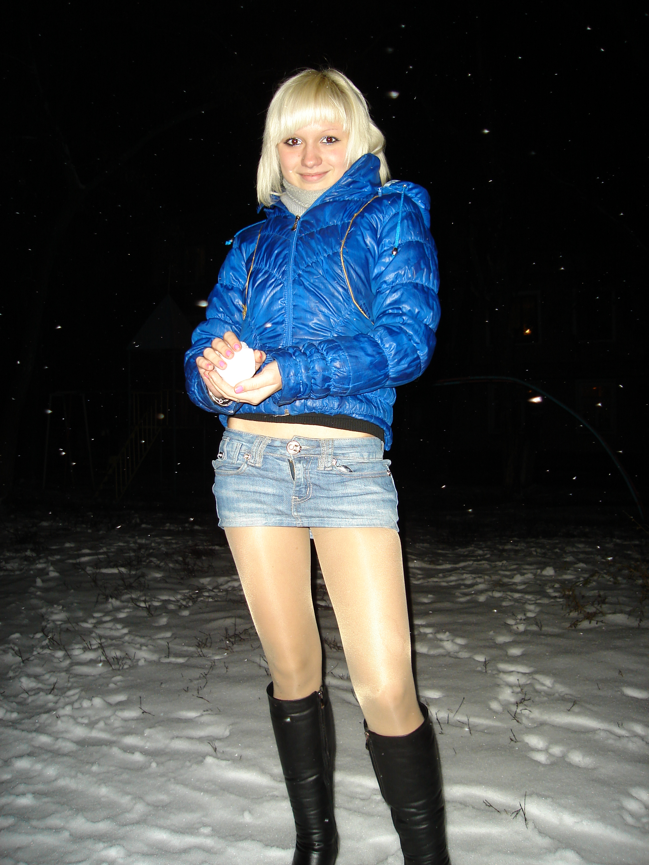 Русская девушка Кристина в микроюбке (Russian girl Kristina in micro skirt)